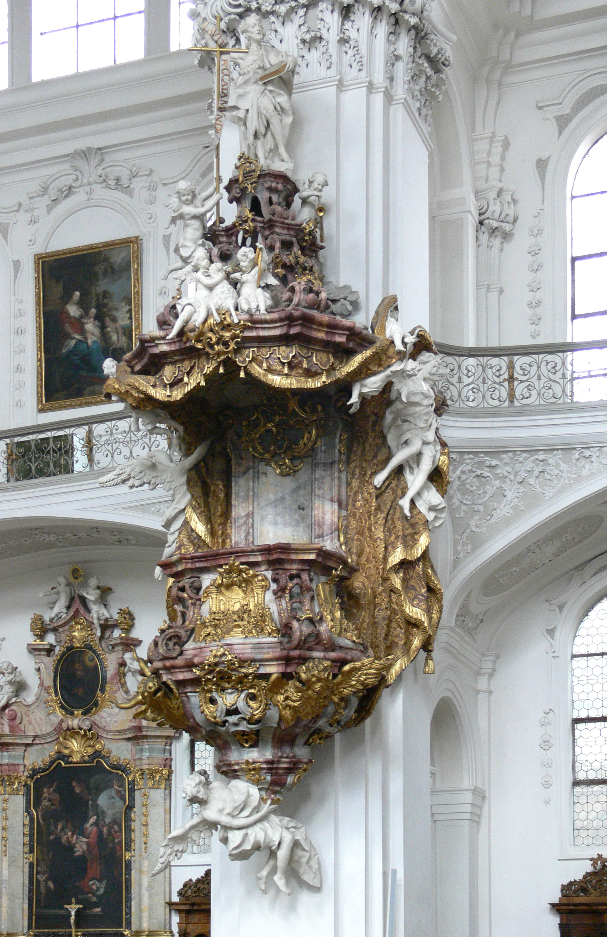 Weingarten, Württemberg, Basilika St. Martin und Oswald, Kanzel von Fidel Sporer, 1762-1765